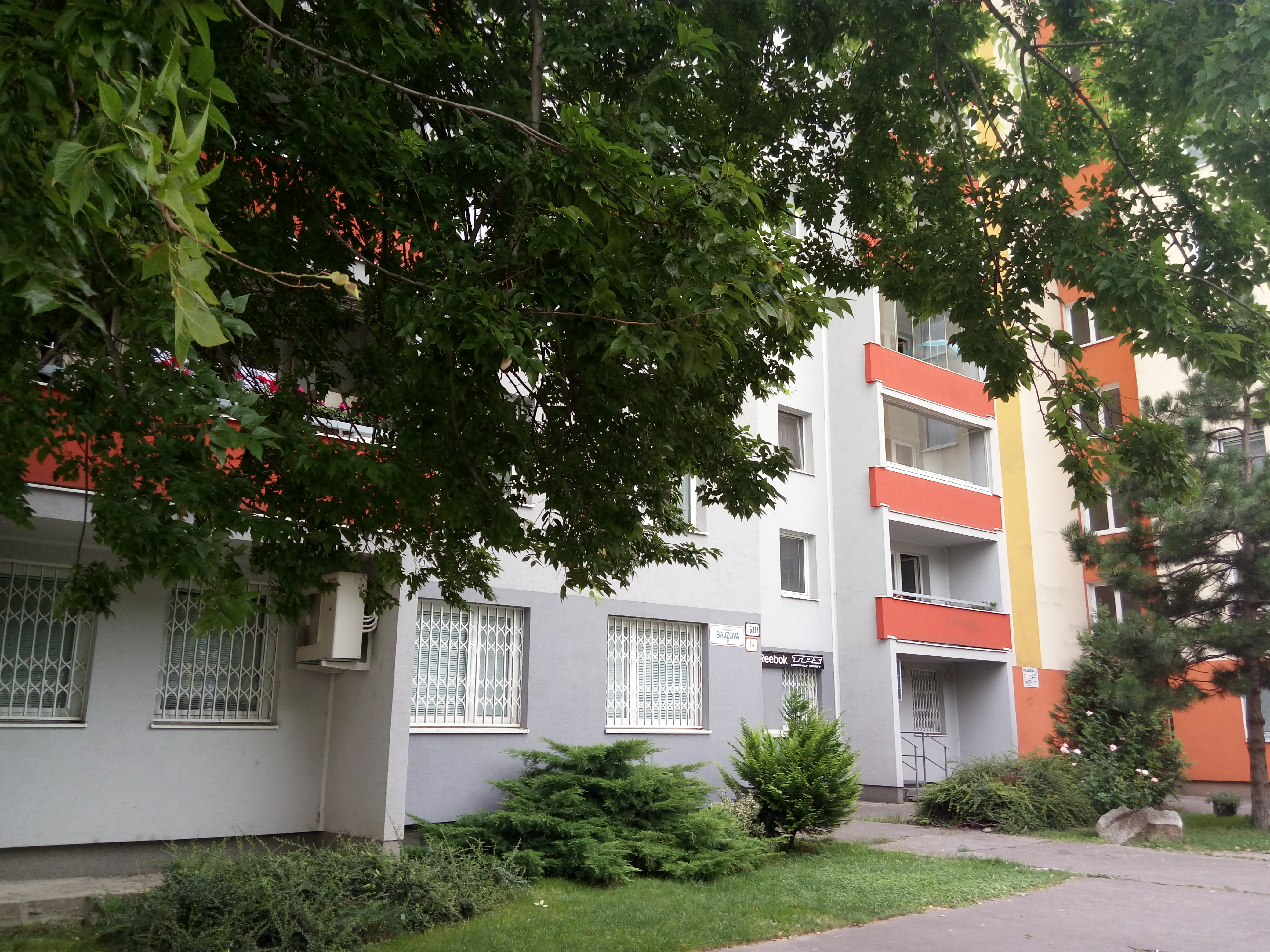 Bajzova 14, Ružinov, Bratislava